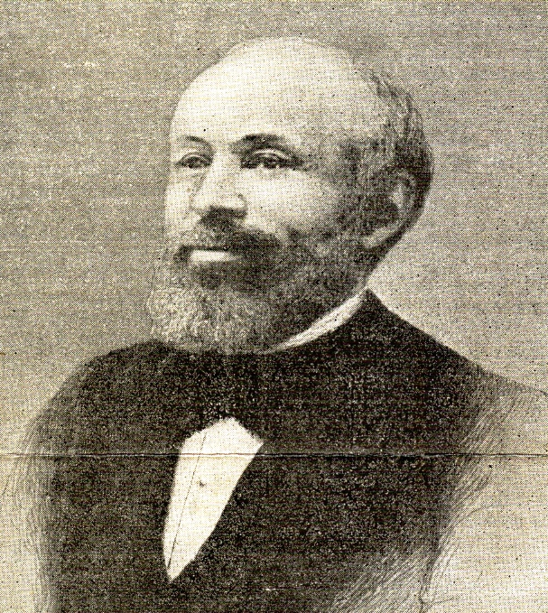 Gravure représentant Louis Herbette.